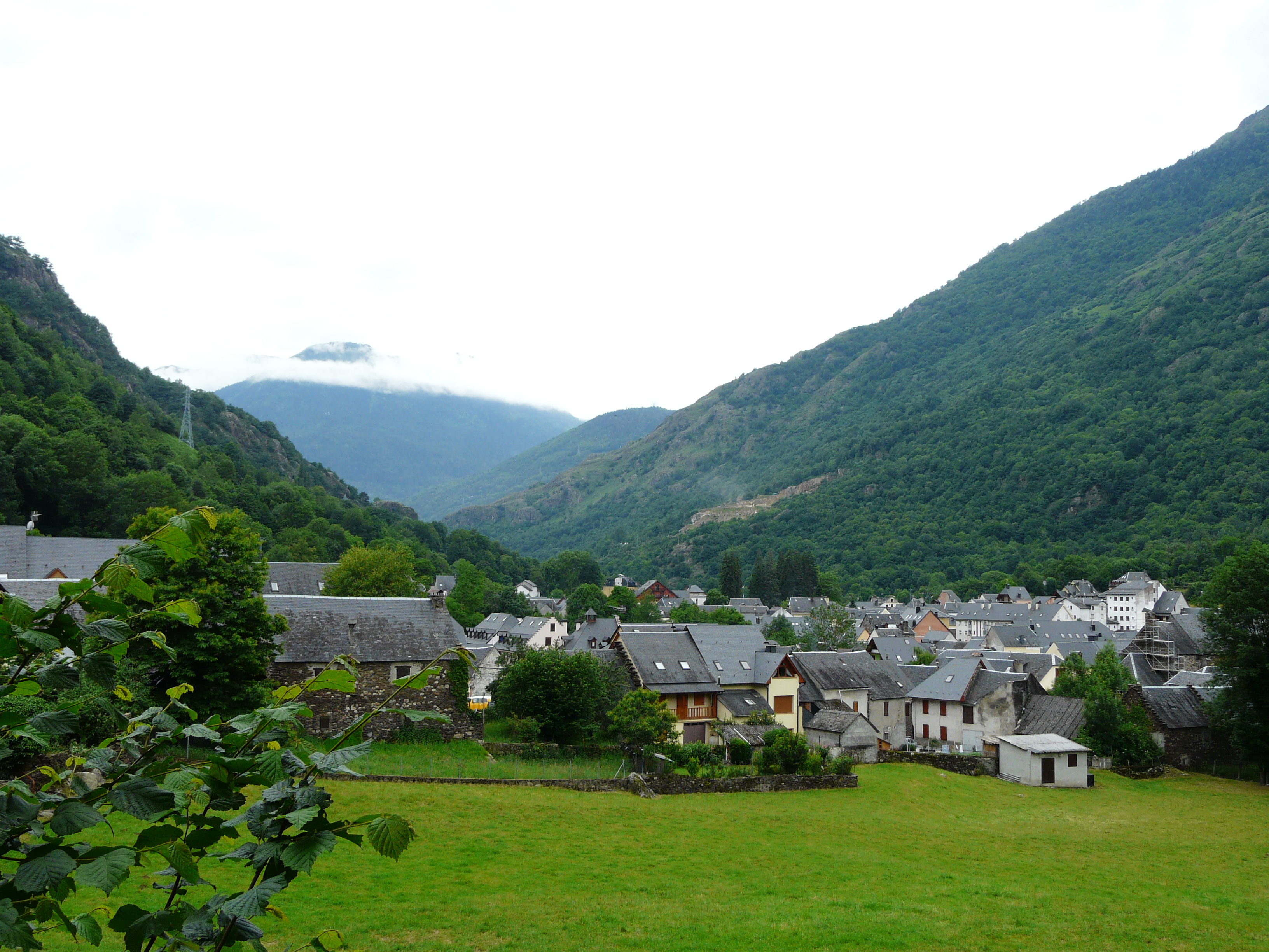 Le village de Les, Val d'Aran, Catalogne, Espagne.